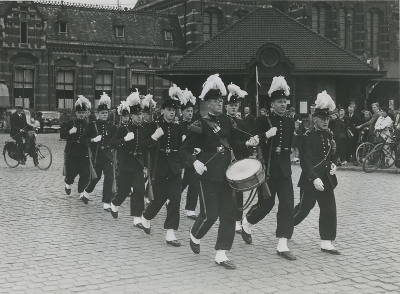 De Utrechtse Studentenweerbaarheid onder commando van G.J. Kolff op het stationsplein op de maandag voor de 27e Vierdaagse.